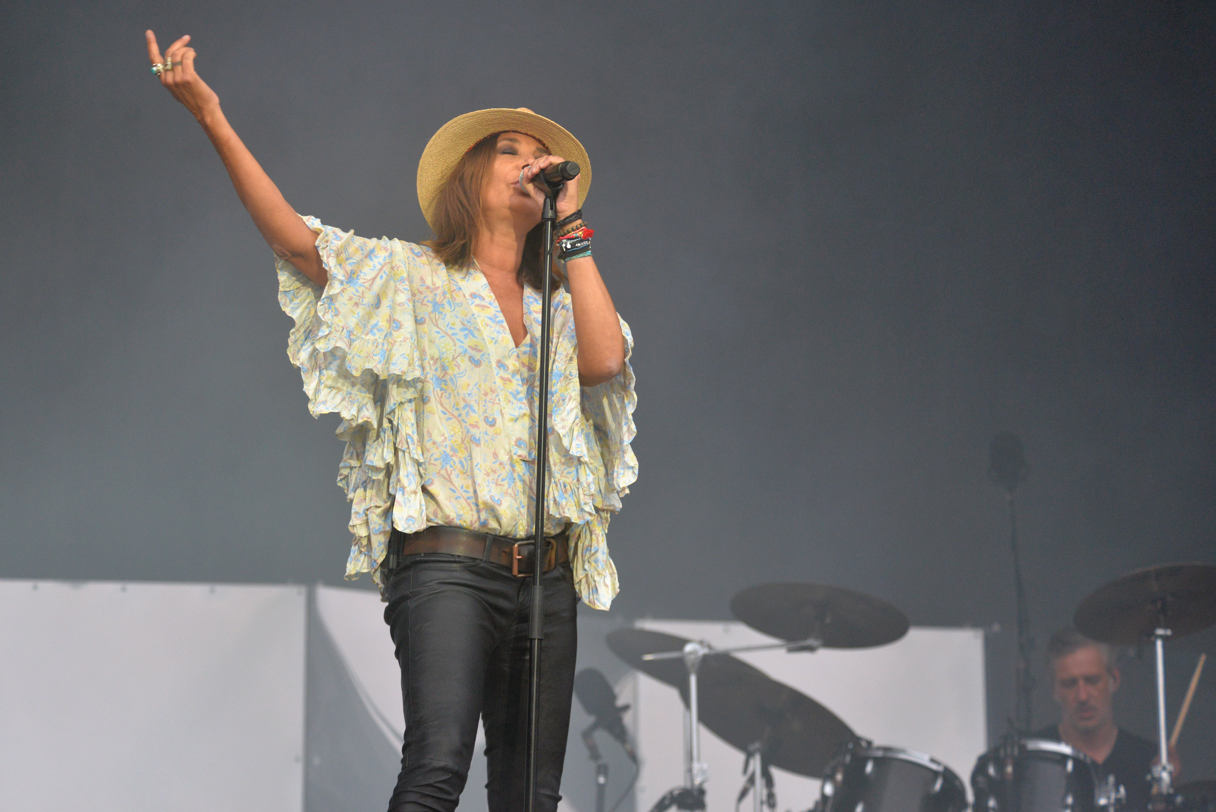 Concert de Zazie au festival Papillons de nuit 2019 à Saint-Laurent de Cuves, Manche, Normandie.